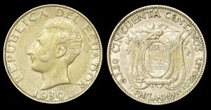 50-centavos-1928